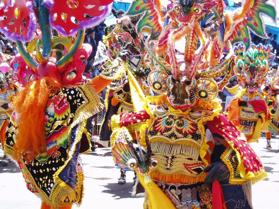 Esta es la primera diablada fundada en 1904